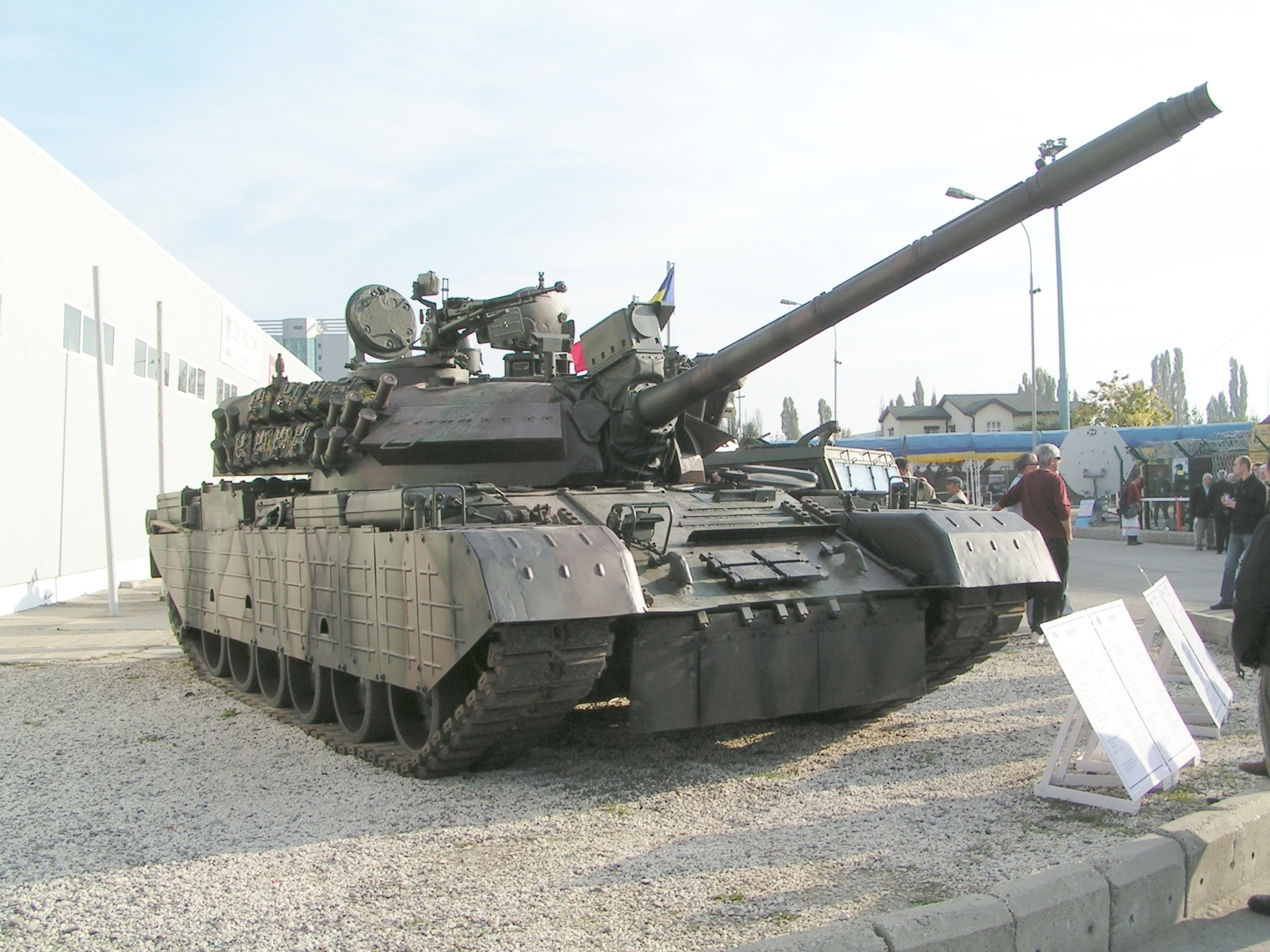 TR-85M1, Expomil-2005, Bucharest-Romania